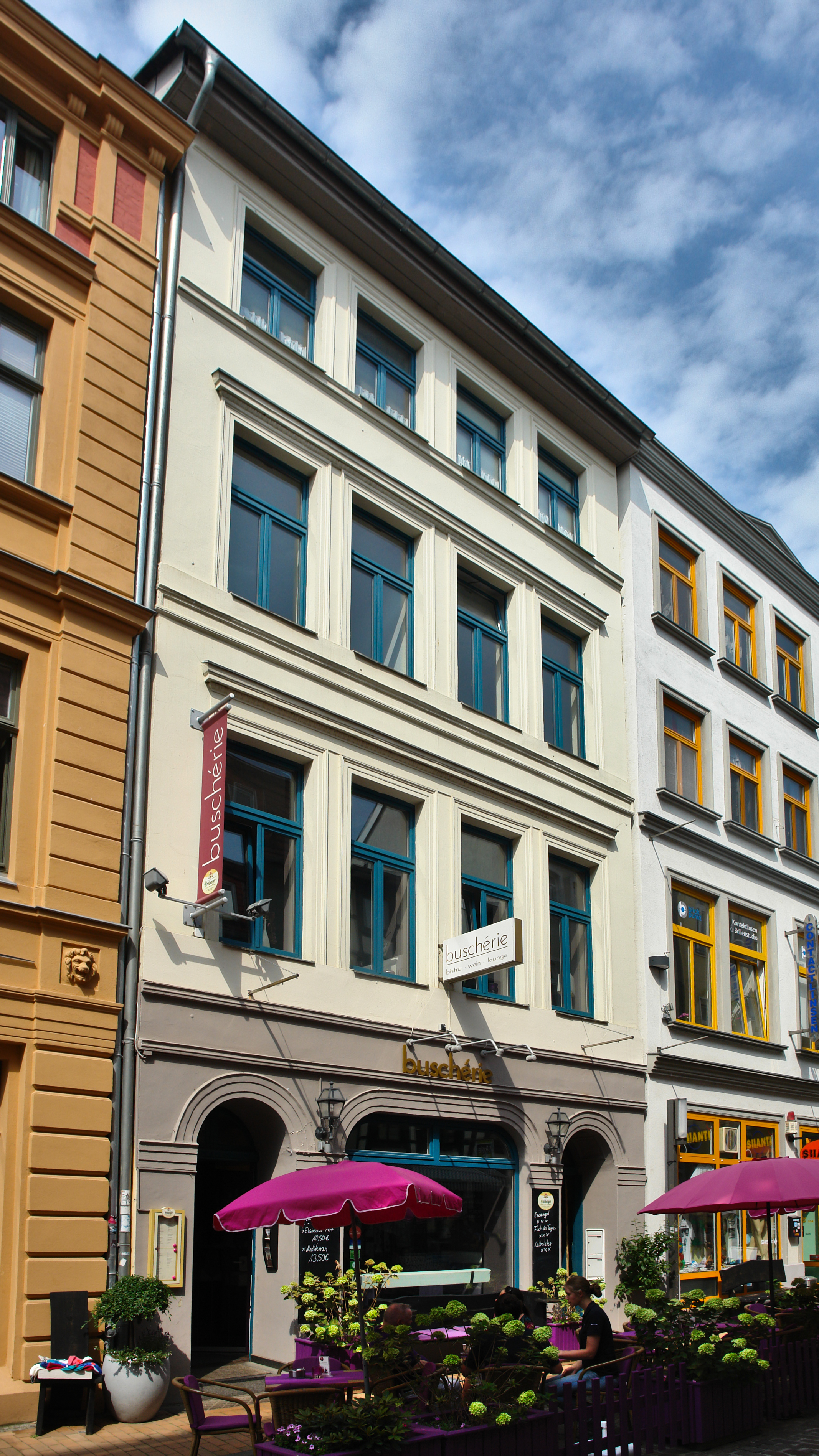 Buschstraße 9, 19053 Schwerin. Bistro Buscherie.